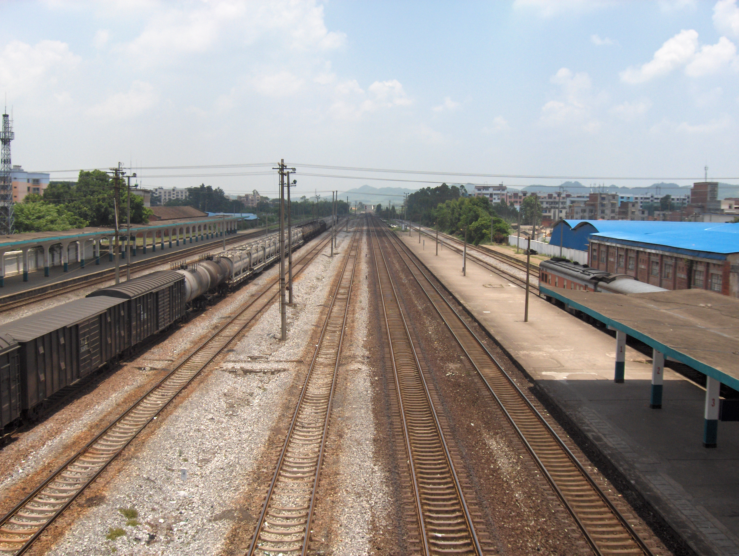 来宾市火车站 上柳州方向站台